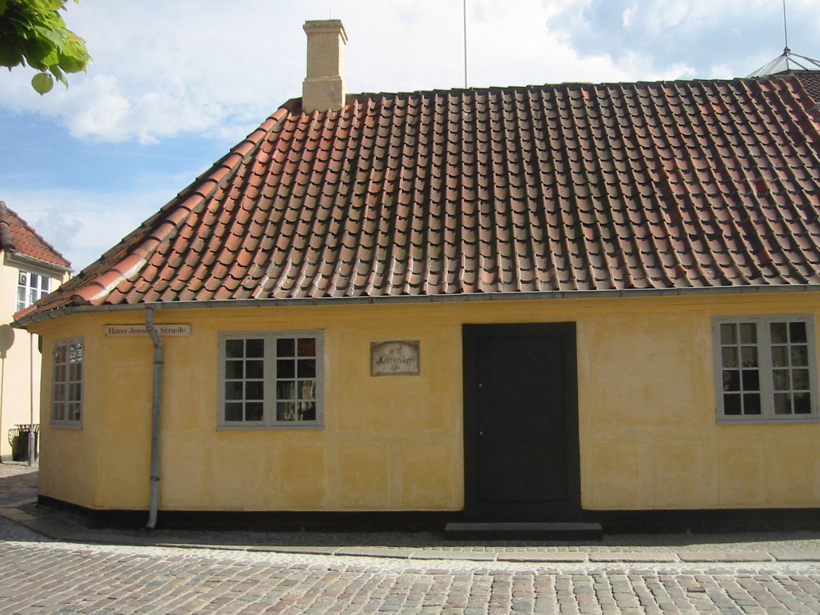 Hans Christian Andersen House, Odense, Denmark